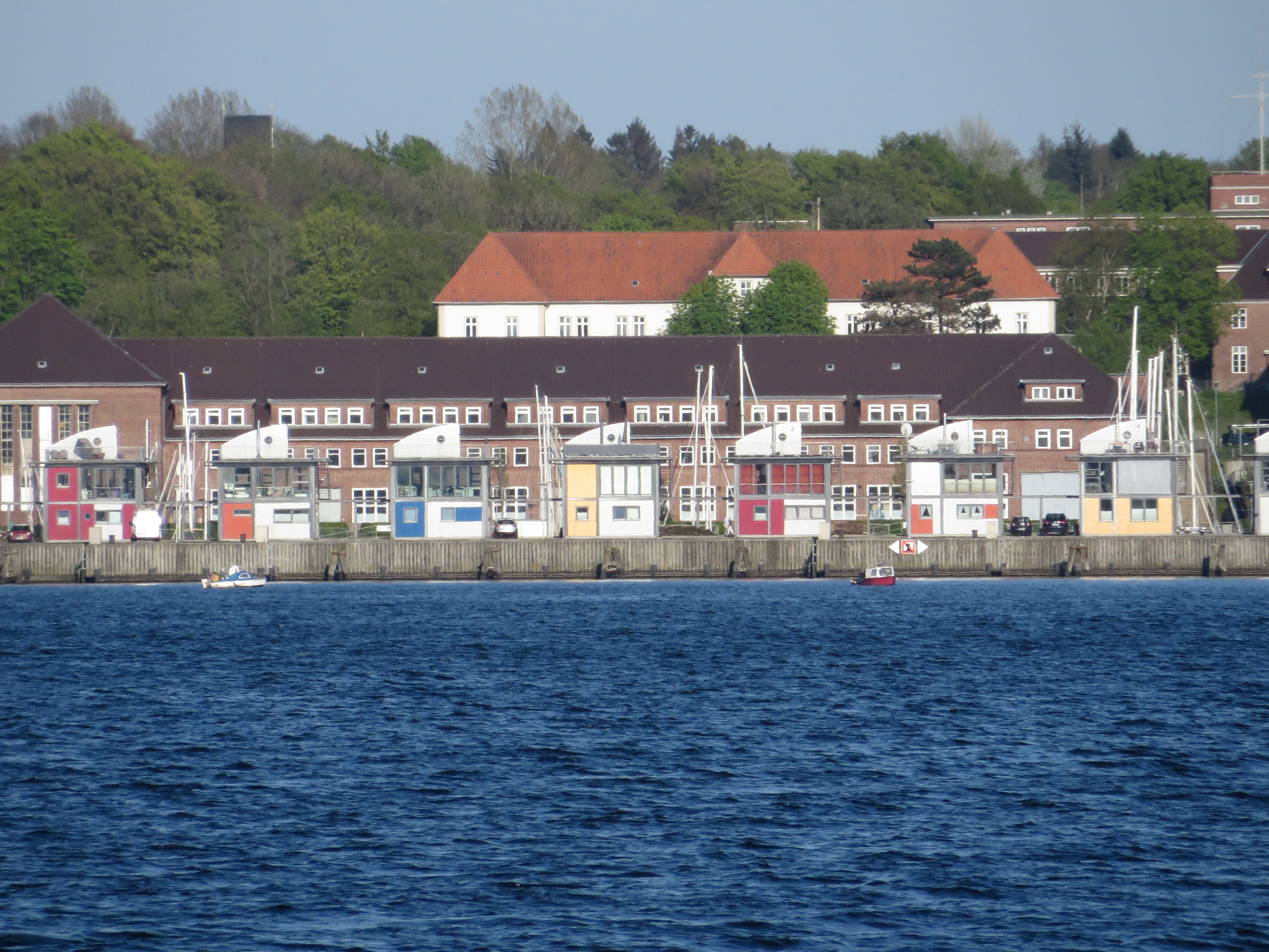 Sonwik mit Tirpitz-Kaserne der Torpedostation der kaiserlichen Marine (1901-1902), Flensburg 2014, Bild 02